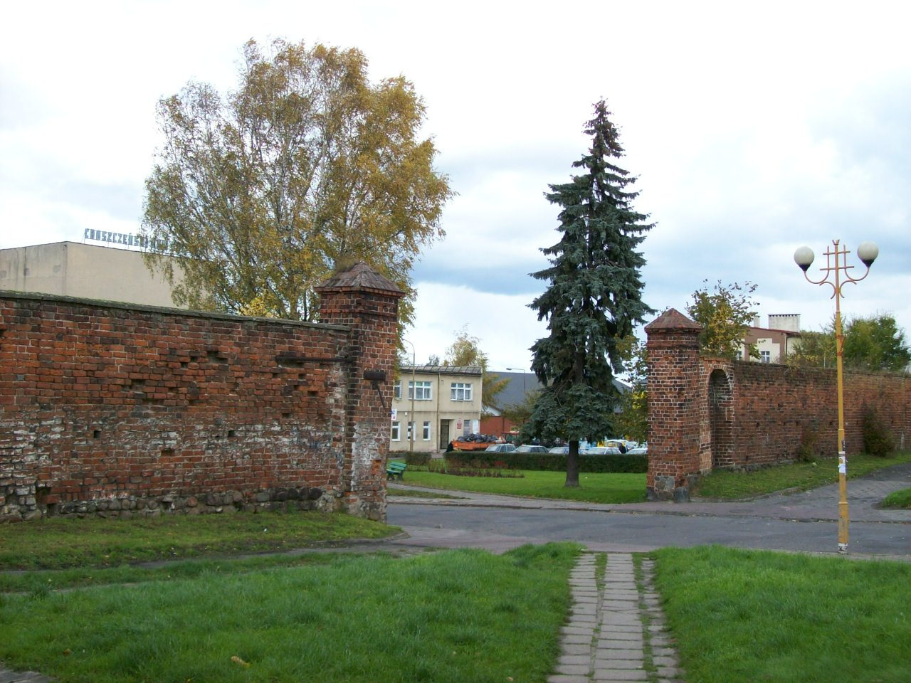 Jedna z trzech zachowanych bram murów obronnych (praca własna)